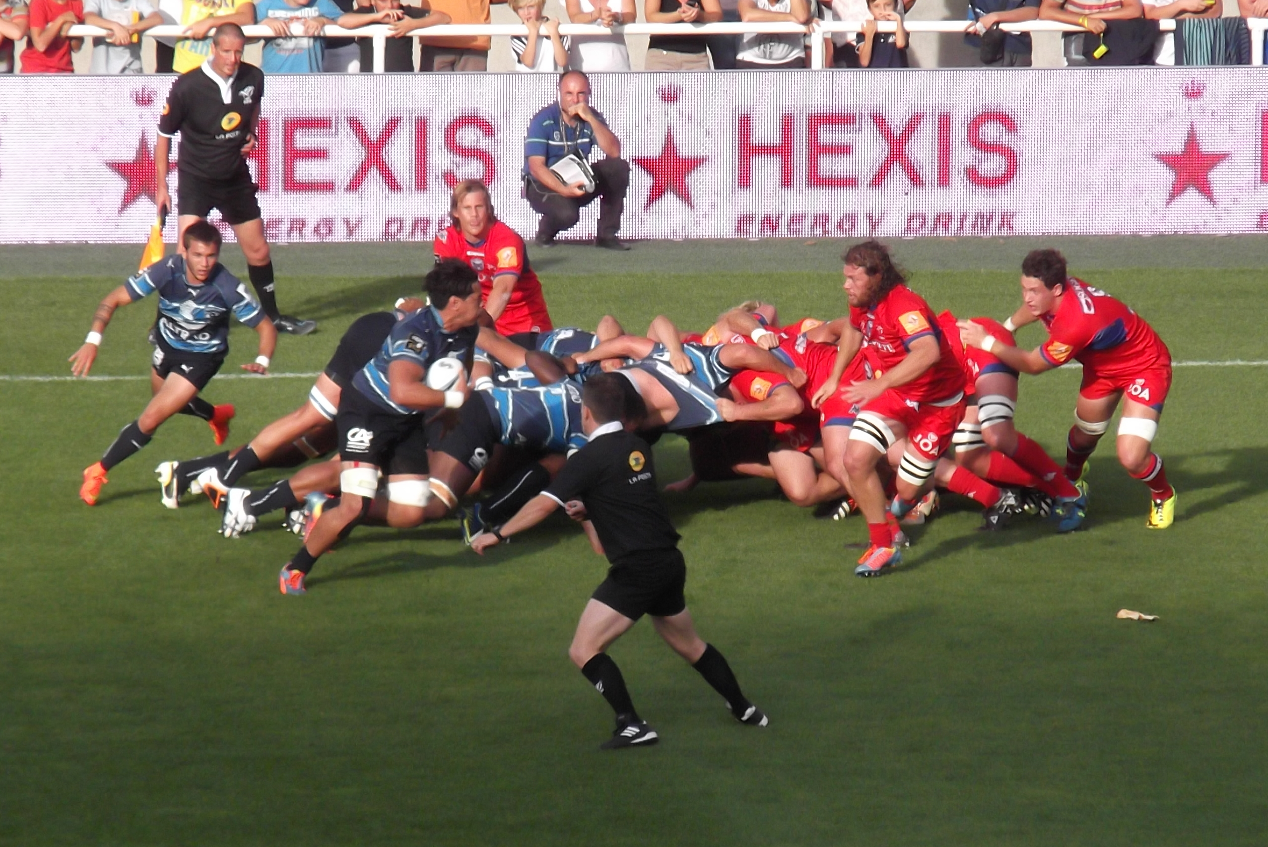 MHR-Grenoble, 23 août 2014.